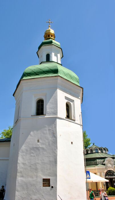 Вежа Івана Кущника в системі фортифікацій Києво-Печерської лаври